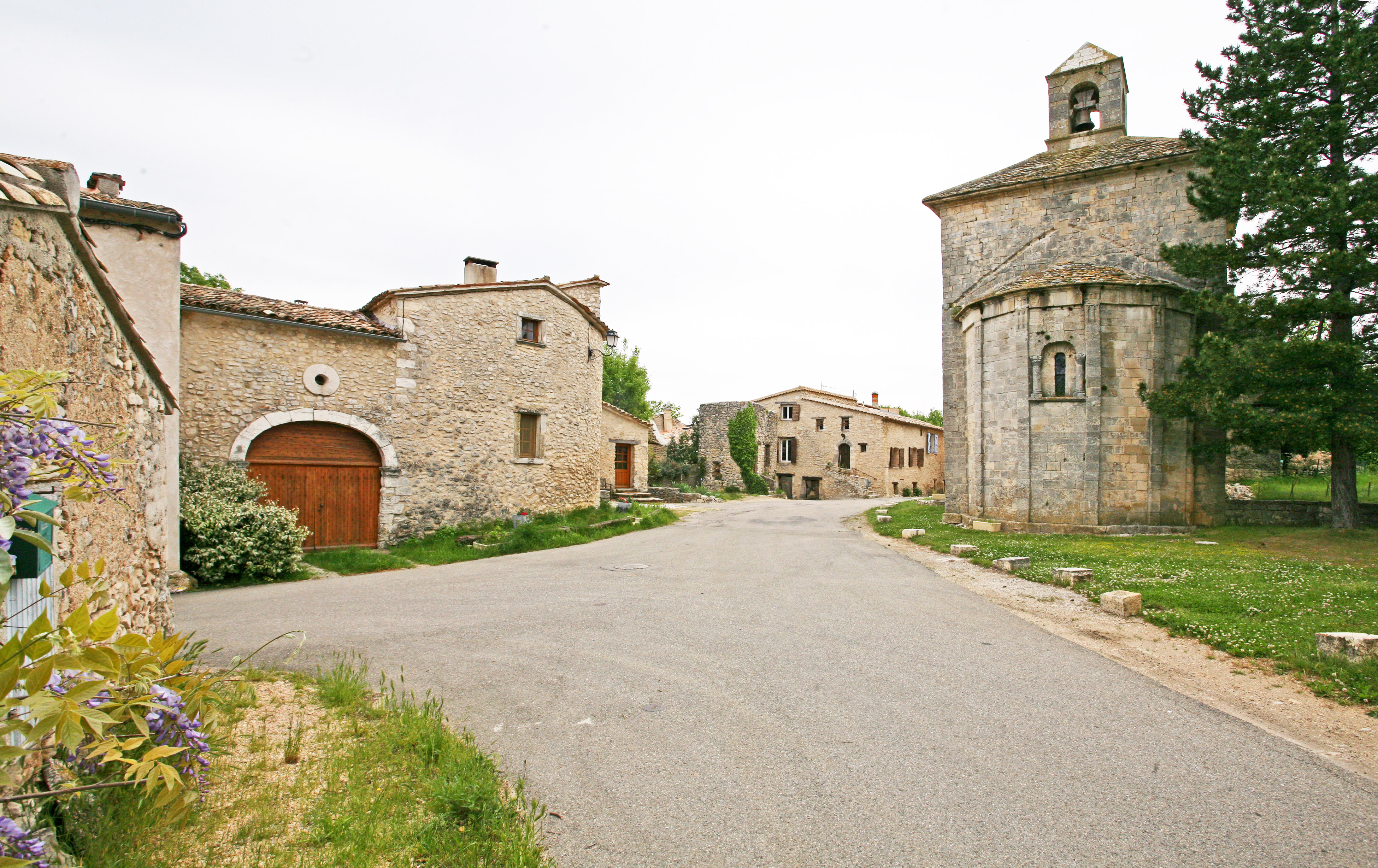 Saint-Trinit (Vaucluse)